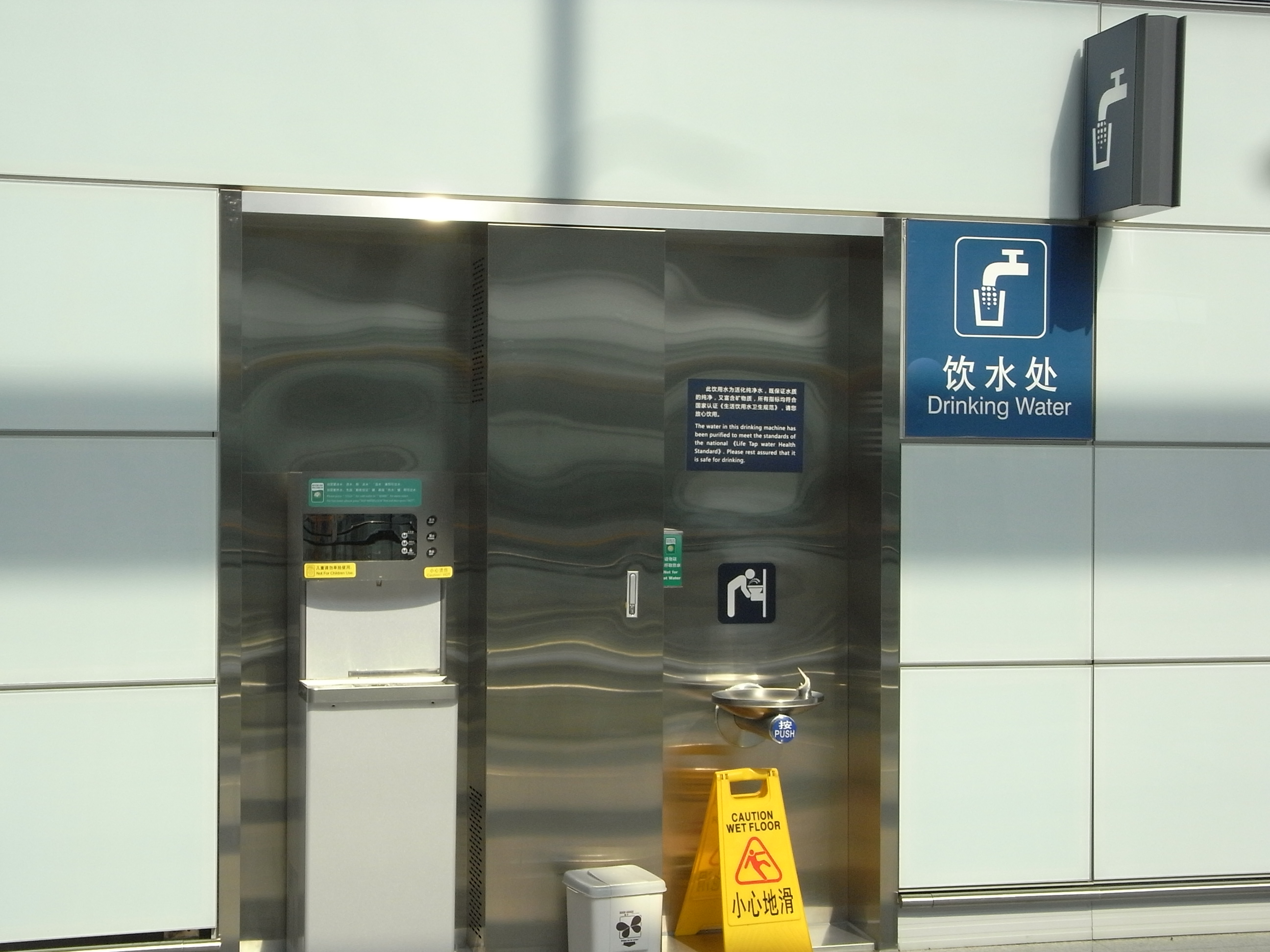 zh:2010年zh:8月北京 北京首都國際機場